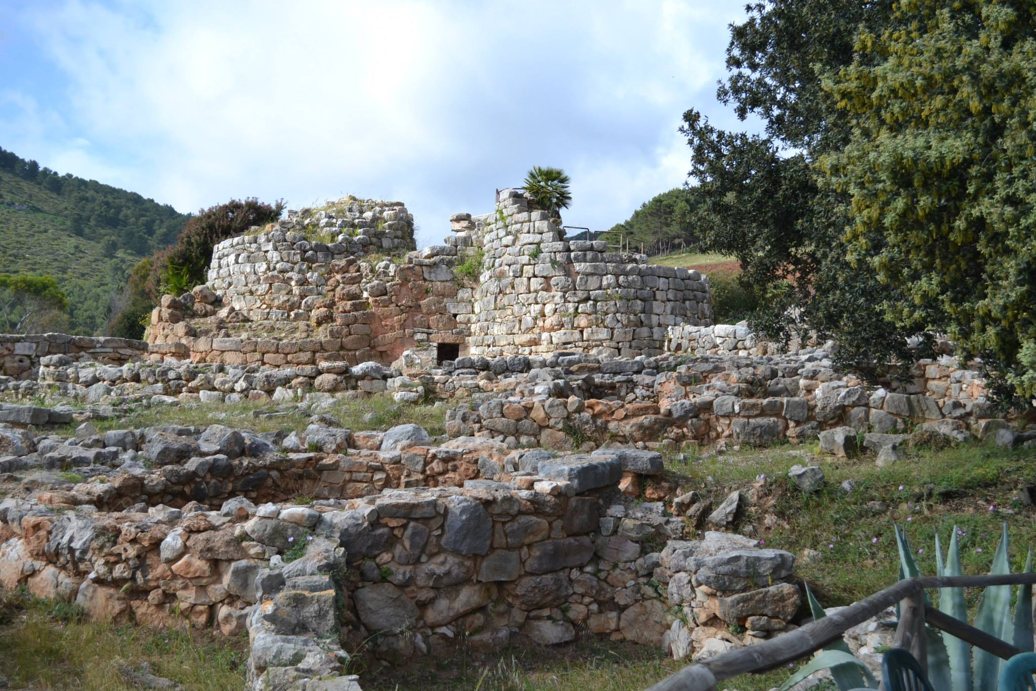 Complesso nuragico di Palmavera - MIBAC This is a photo of a monument which is part of cultural heritage of Italy.